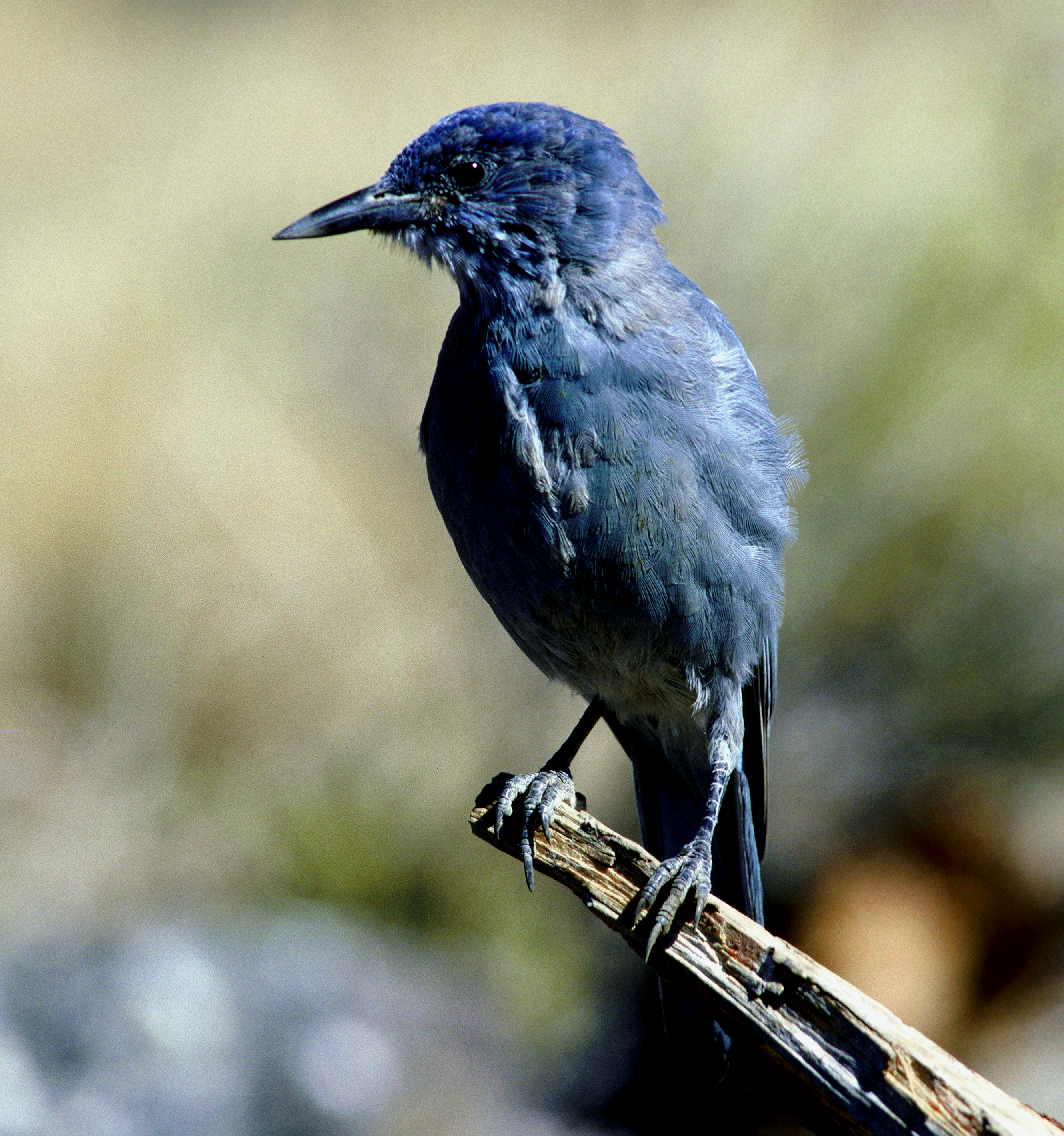 Pinyon Jay (Gymnorhinus cyanocephalus)